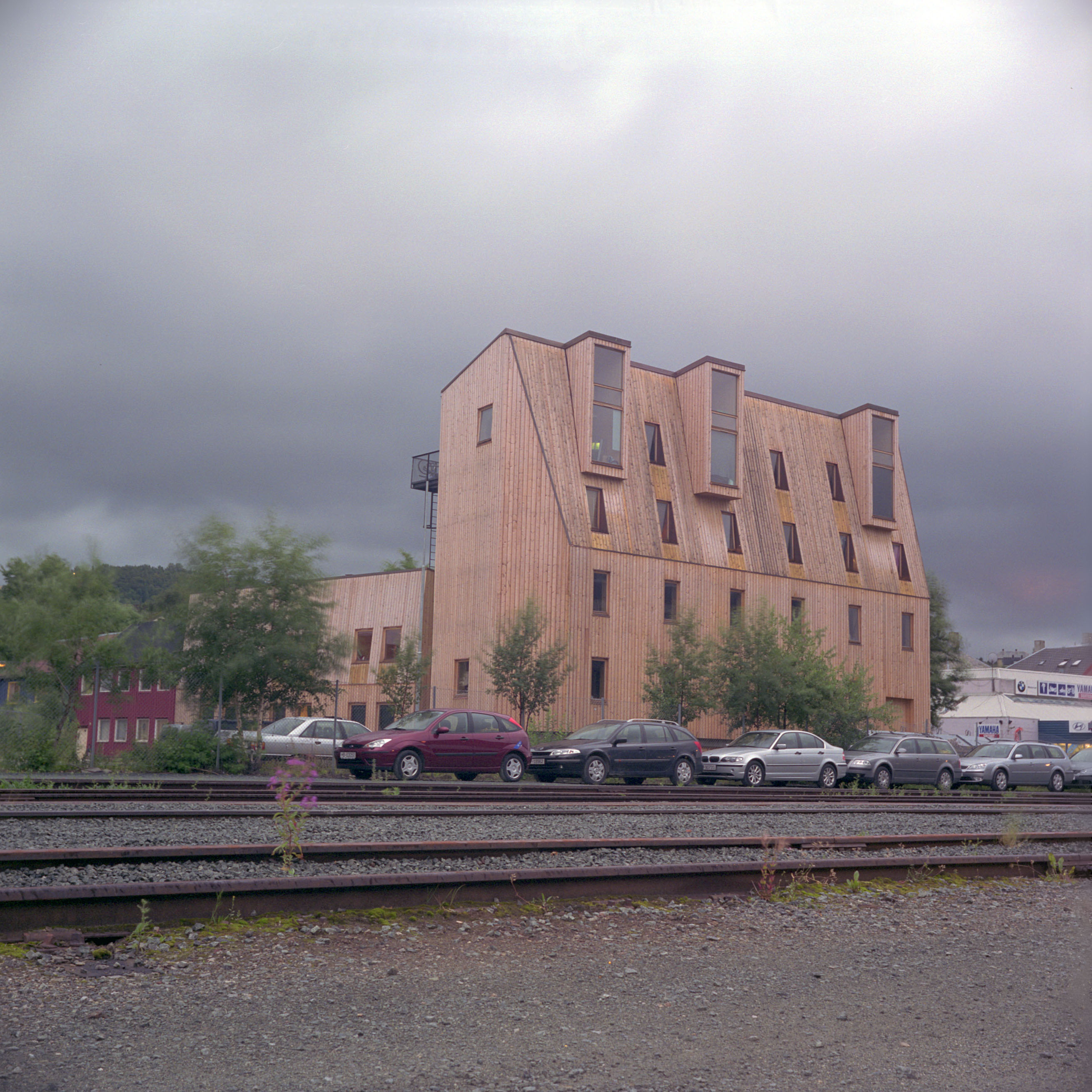 Strandveien 37 på Svartlamon i Trondheim. Norsk arkitektur fra 2000-åra. [1]